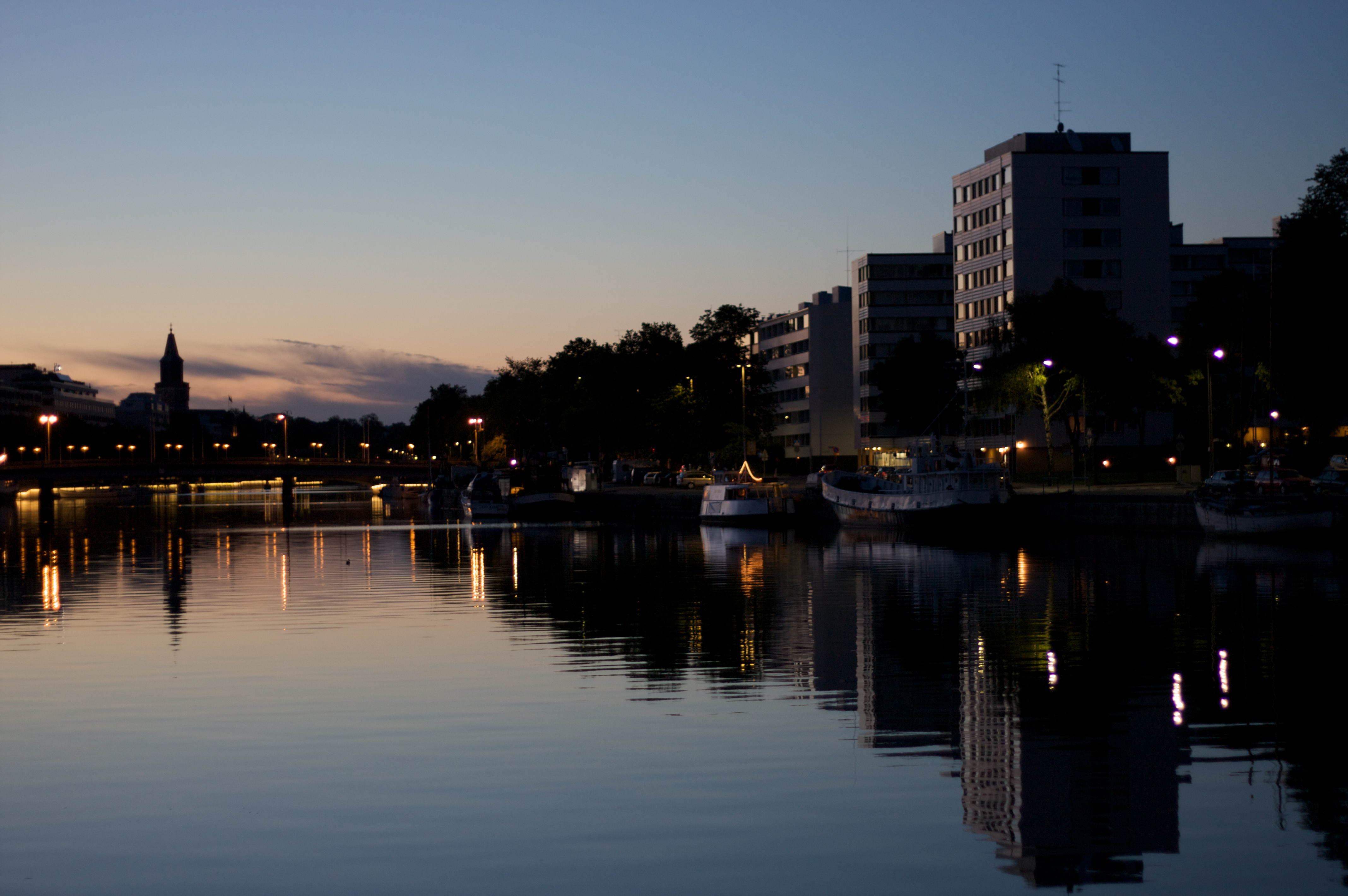 Turku at night